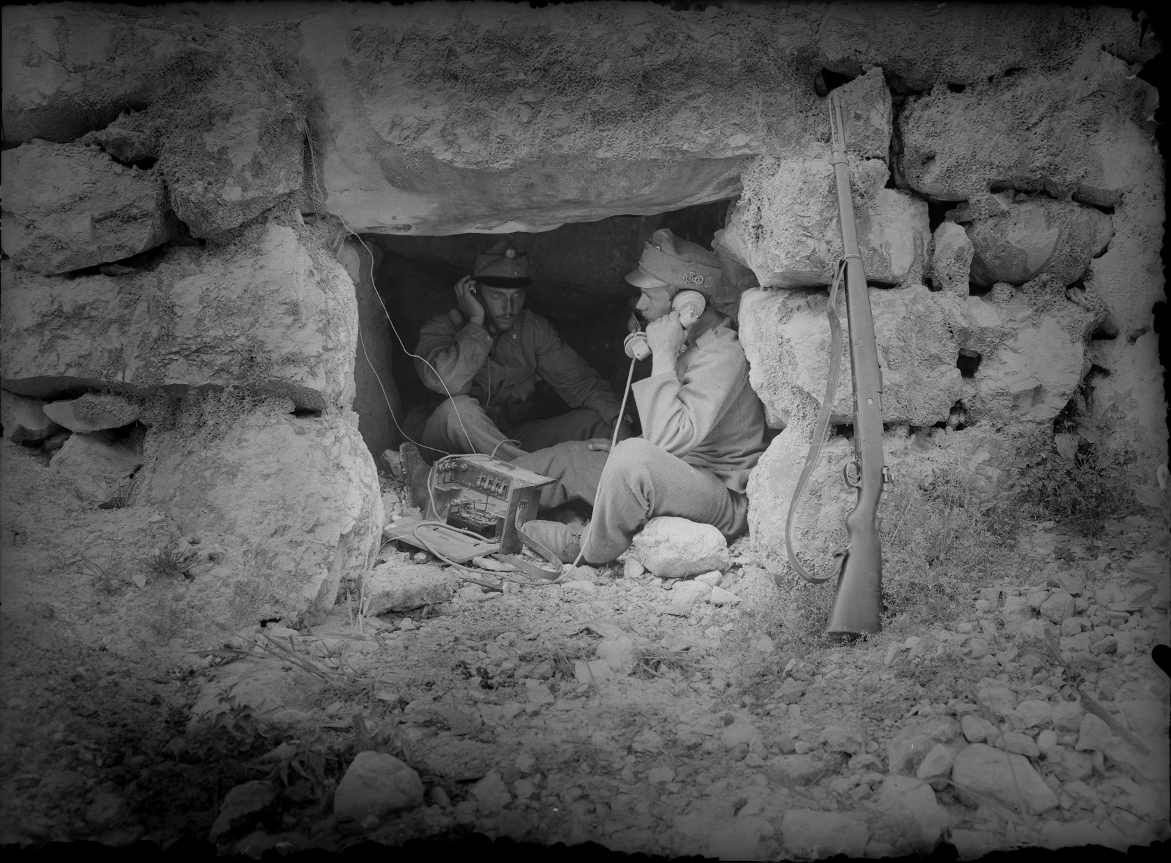 Feldtelefon-Station am Rombon.